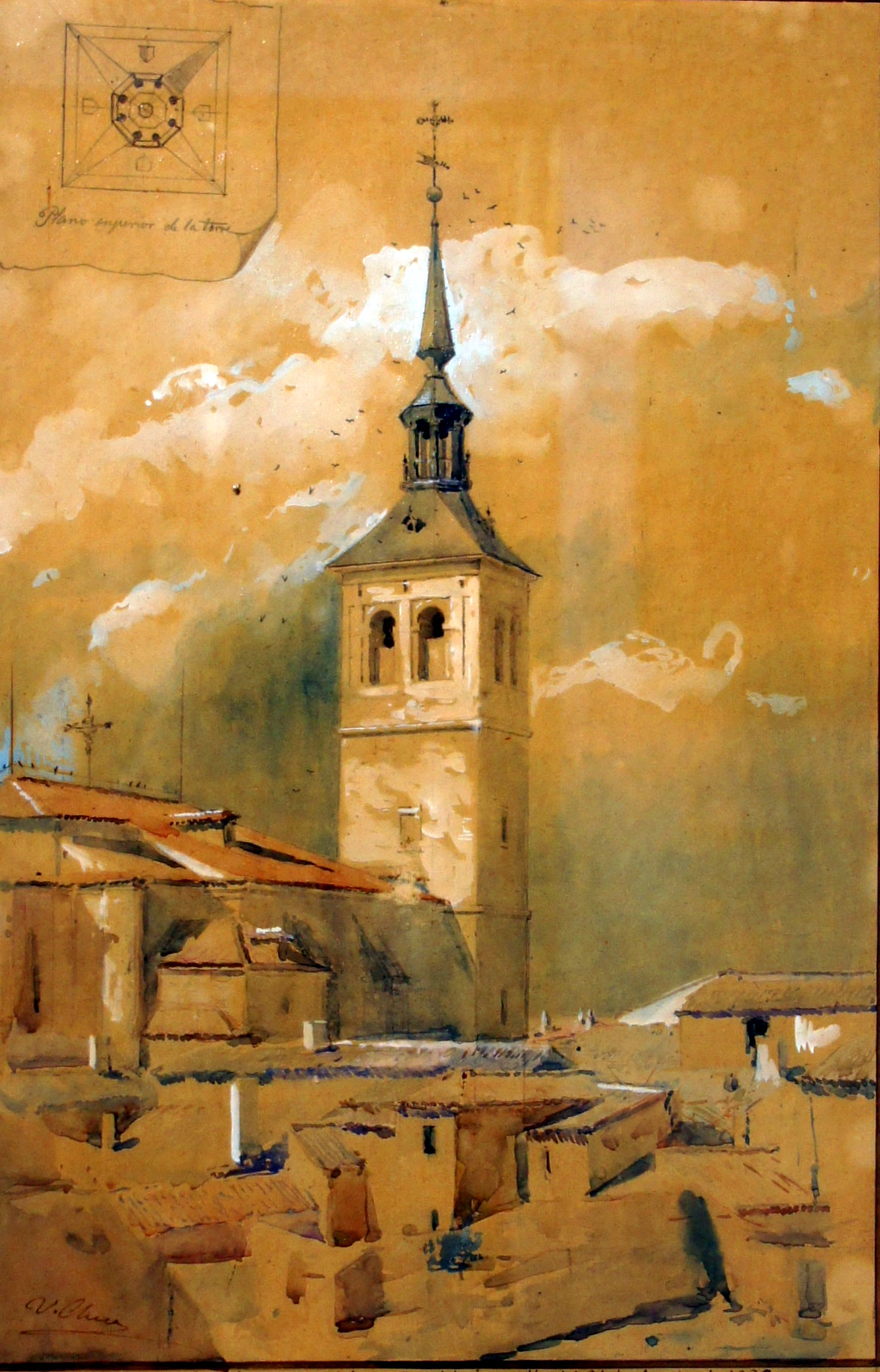 Torre de Colmenar de Oreja. Acuarela sobre papel. 52,1 x 37 cm. Manuscrito por el pintor "Torre de Colmenar de Oreja como esytaba antes del incendio del 21 de agosto de 1886. Apunte tomado desde el Zacatín por U. Checa". La torre de la iglesia de Colmenar de Oreja es de Juan de Herrera. Donación de la Iglesia de Santa María la Mayor de Colmenar de Oreja. 1995.